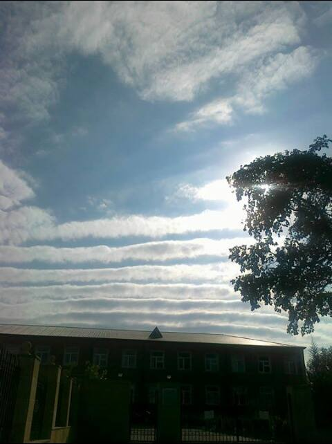 gözəl buludlar